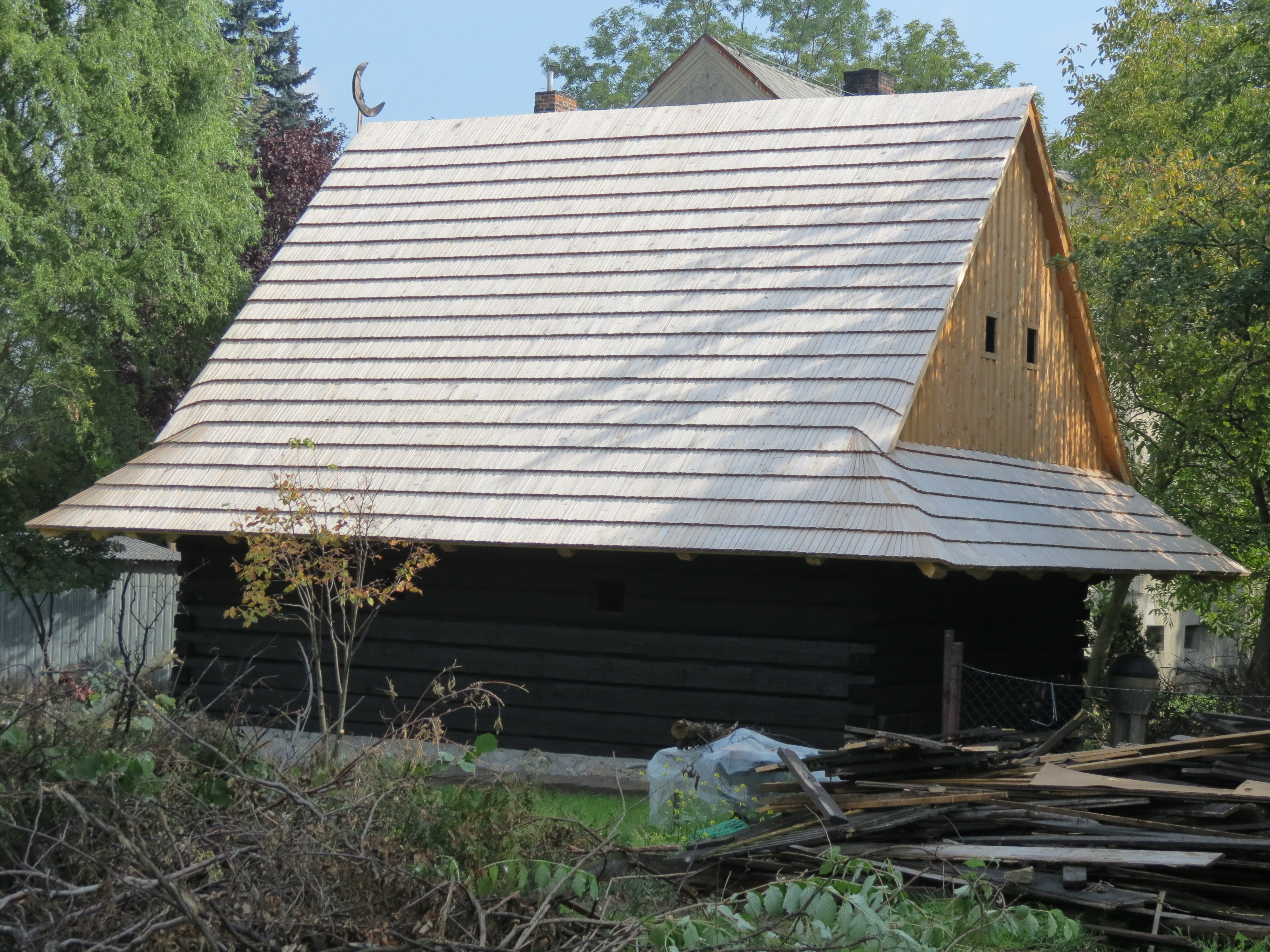 Przyszowice - spichlerz plebański z przełomu XVIII i XIX w., drewniany (zabytek nr A/600/66)